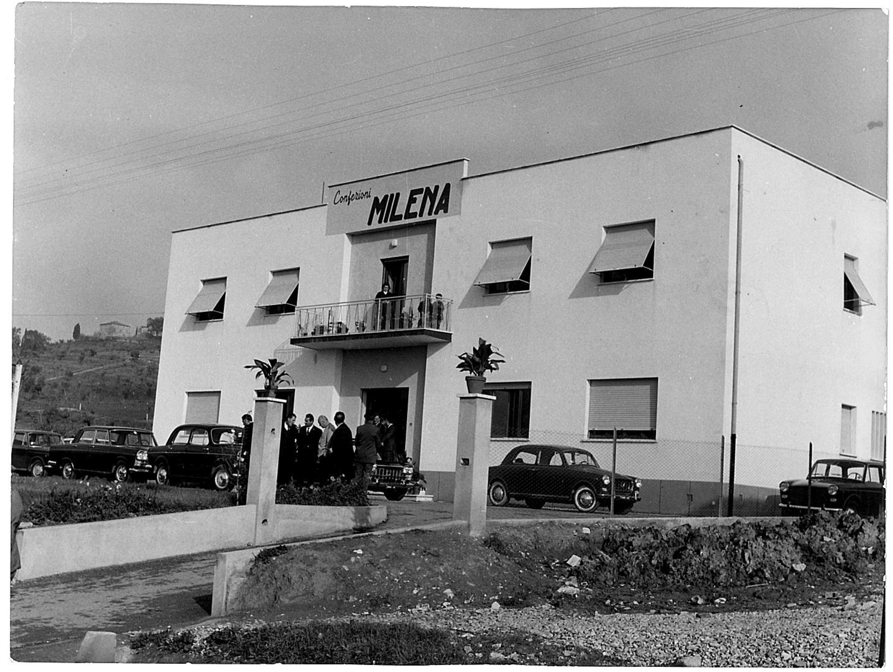 Milena Confezioni inaugurazione nuova sede 14 Febbario 1953